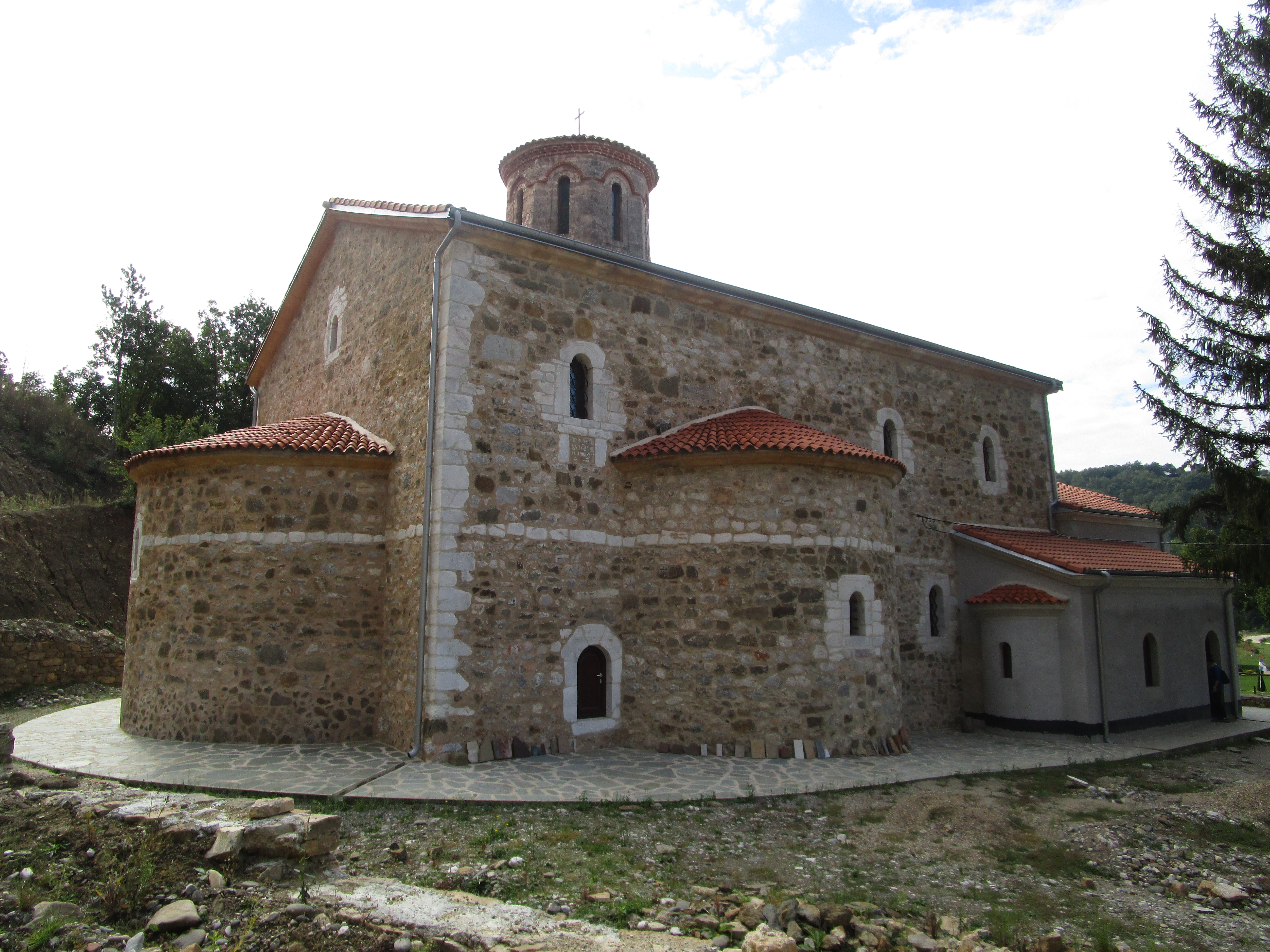 Српски (ћирилица): Манастир Суково